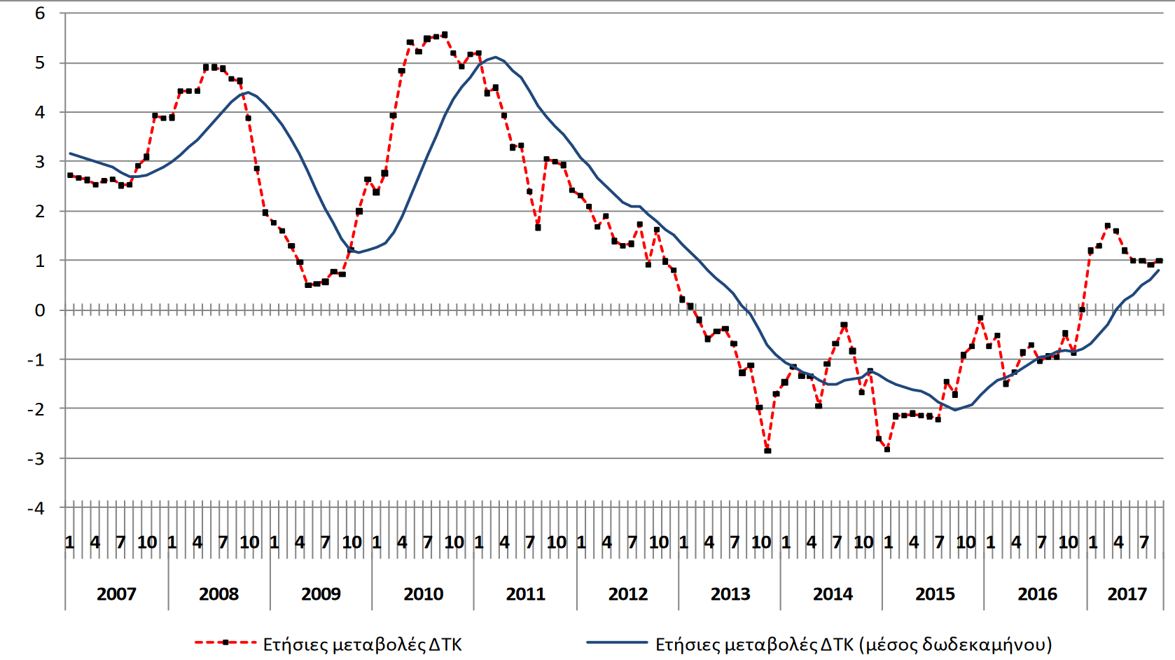 Ετήσιες και μέσες ετήσιες μεταβολές (%) του ΔΤΚ. Πηγή ΕΛΣΤΑΤ